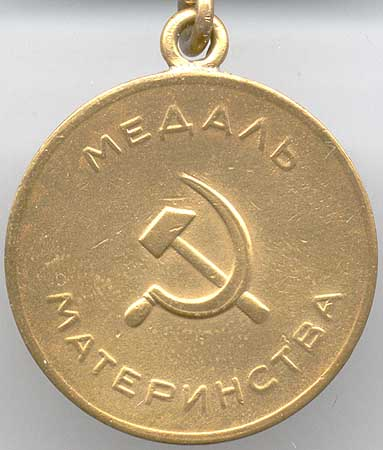 «Медаль материнства» II степени, обратная сторона